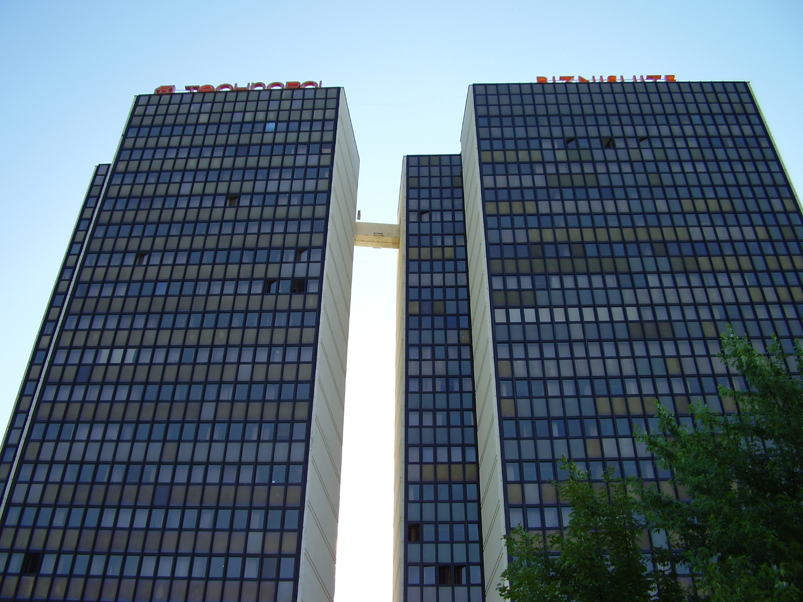 Technopol.